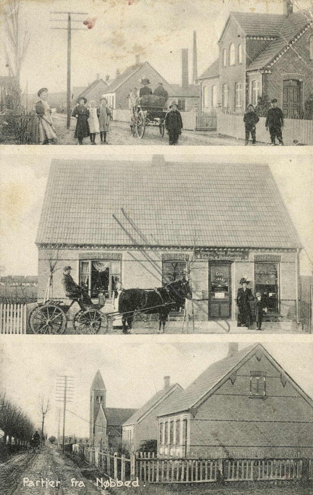 Nøbbet i Horslunde Sogn - historisk postkort fra Vest-Lolland